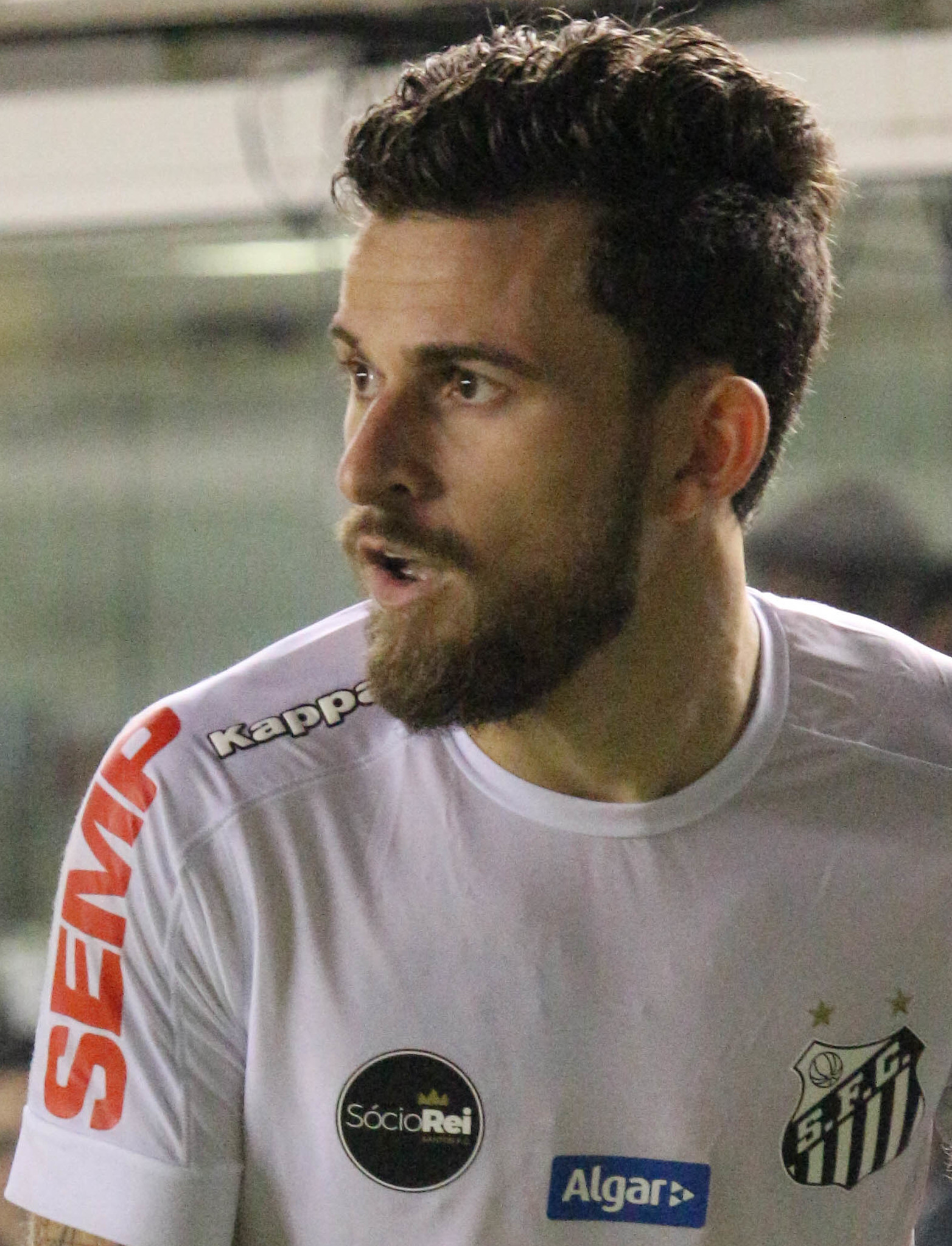 Foto: Douglas Teixeira/Futebol Santista